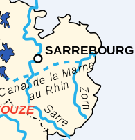 La Zorn en Lorraine.